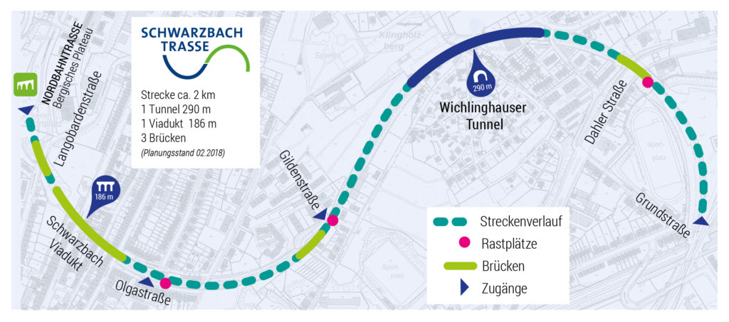 Übersicht des Bauprojektes